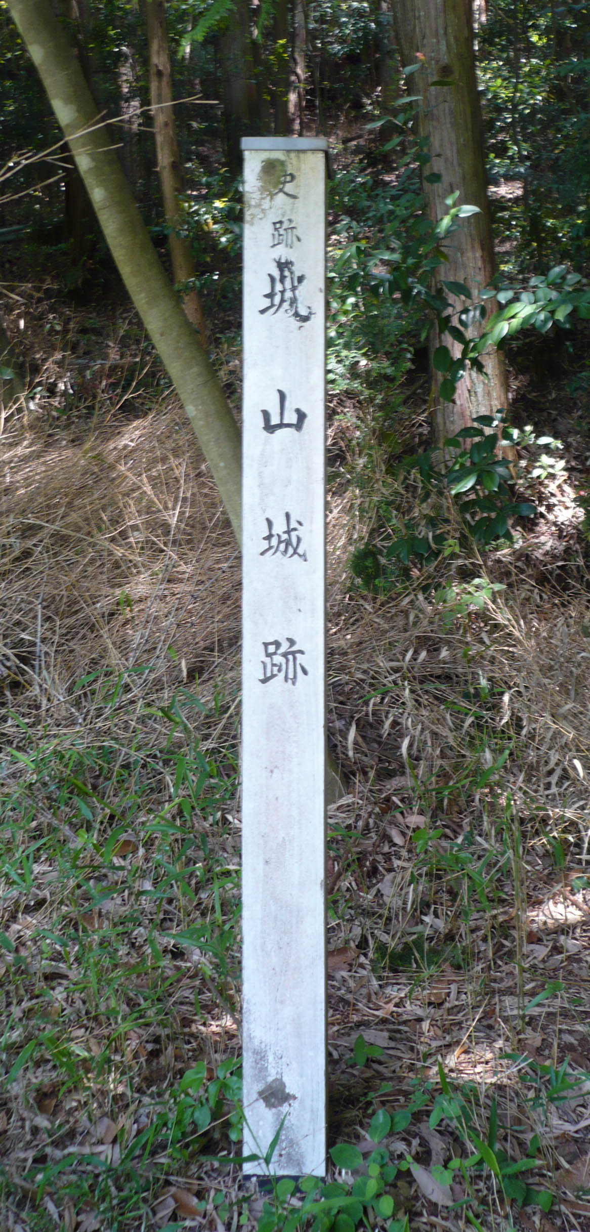 丸山城の標木